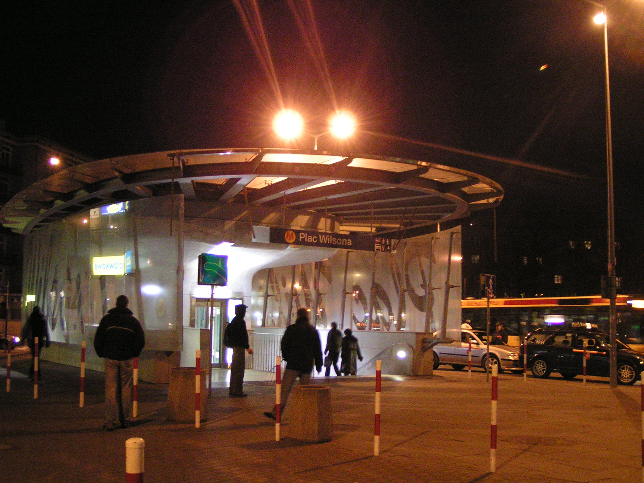 Wejście do stacji Plac Wilsona.